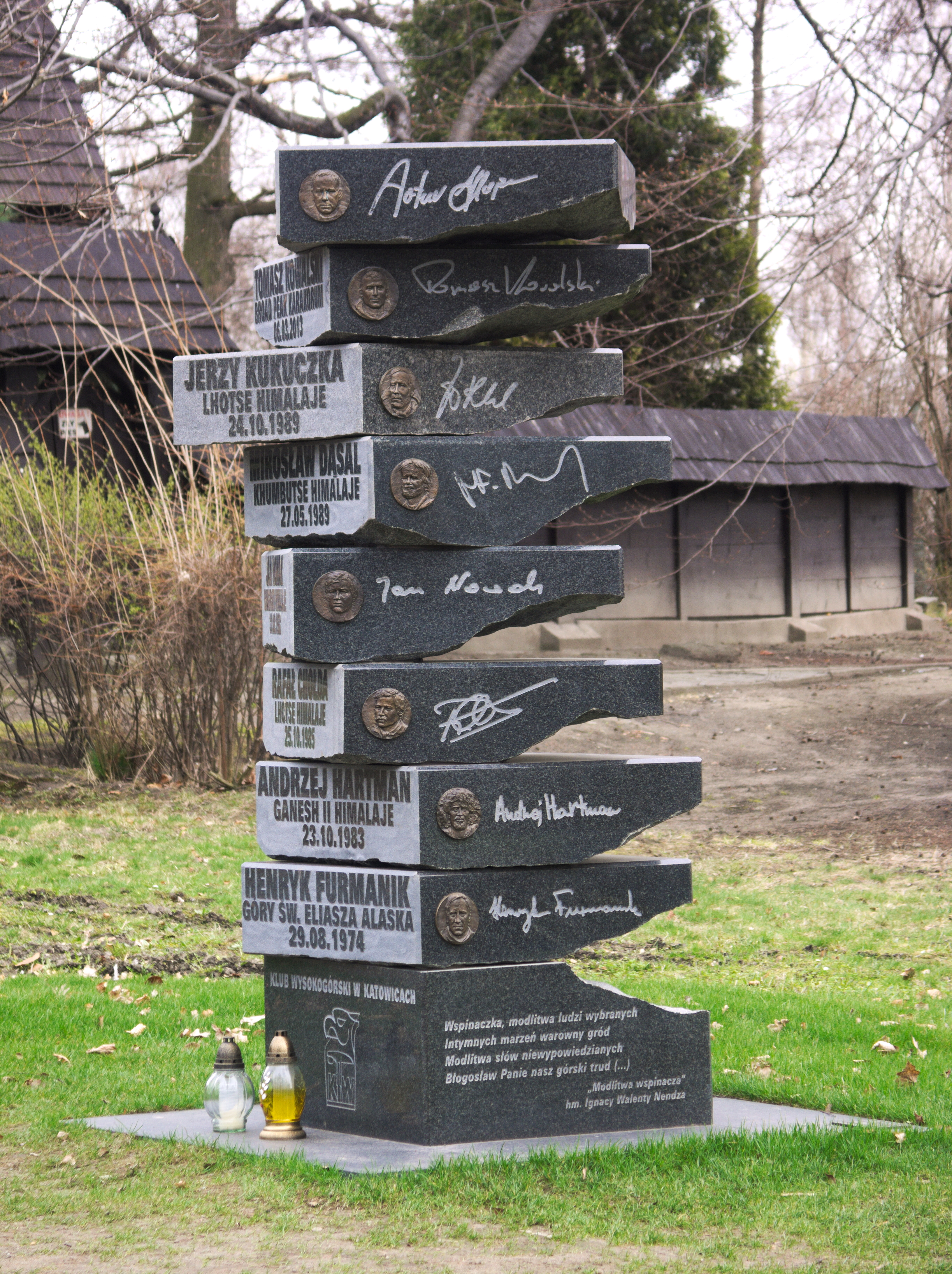 Pomnik ku pamięci wspinaczy wysokogórskich, którzy zginęli w czasie wypraw: Artur Hajzer, Tomasz Kowalski, Jerzy Kukuczka, Mirosław Dąsal, Jan Nowak, Rafał Chołda, Andrzej Hartman, Henryk Furmanik. Ufundowana przez Klub Wysokogórski w Katowicach, Park Kościuszki.